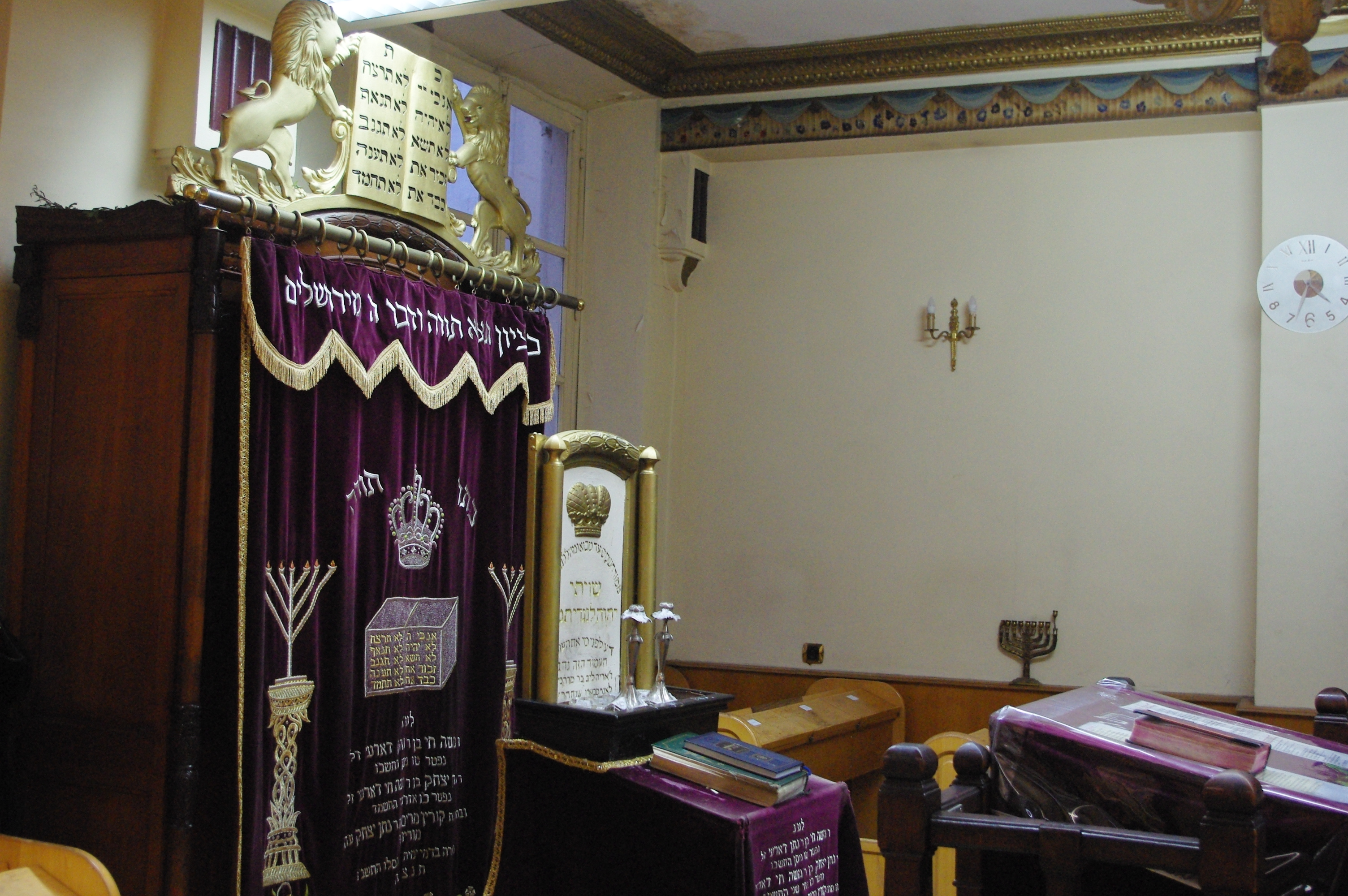 L'Arche sainte (Aron) et la bimah de la synagogue 17 rue des Rosiers à Paris